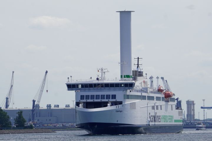 Die Scandlines-Fähre Copenhagen mit neuem Rotorsegel im Rostocker Seekanal.